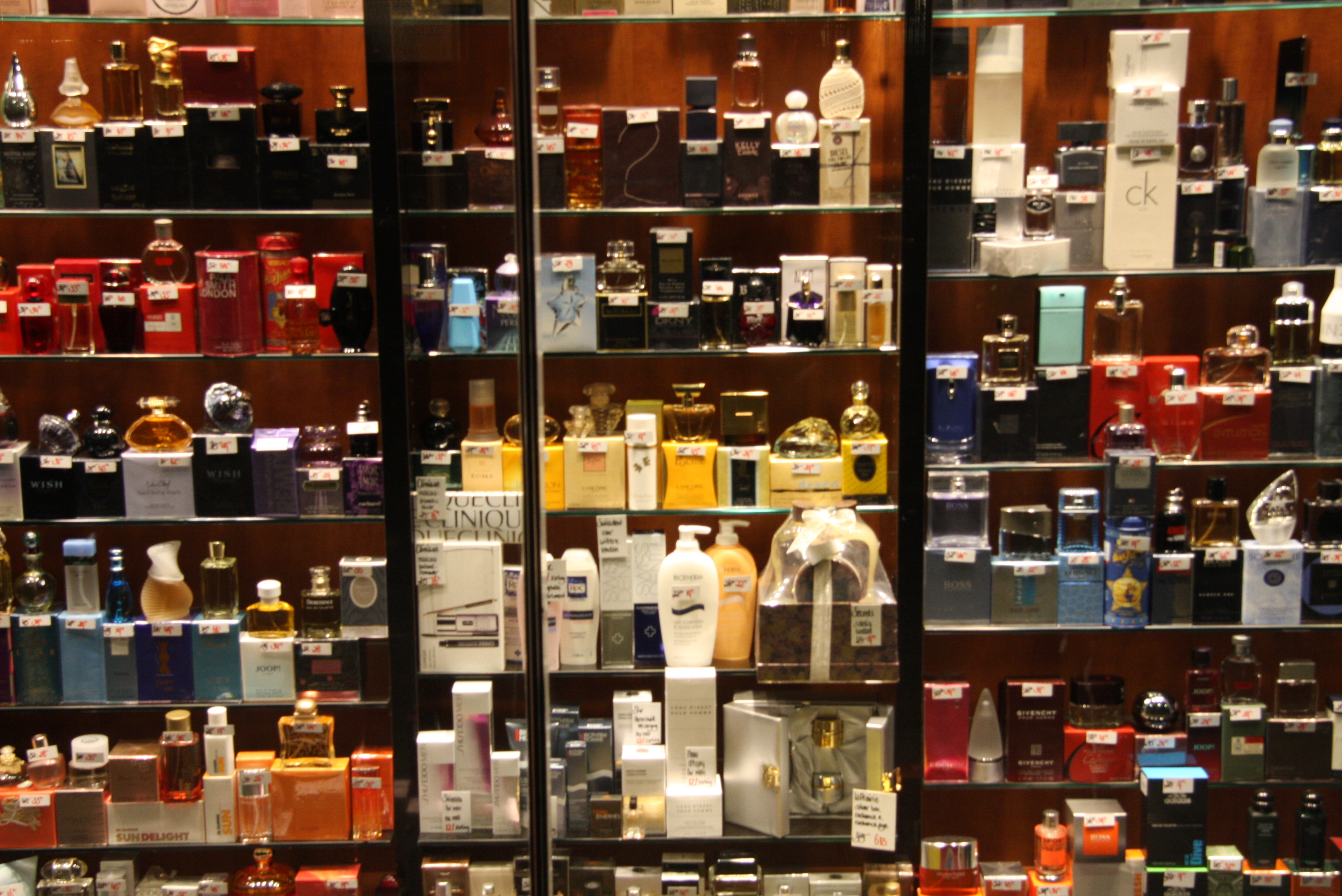 Parfumerie